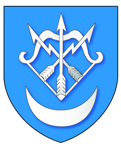 Беларуская (тарашкевіца): Герб гораду Белаазёрску